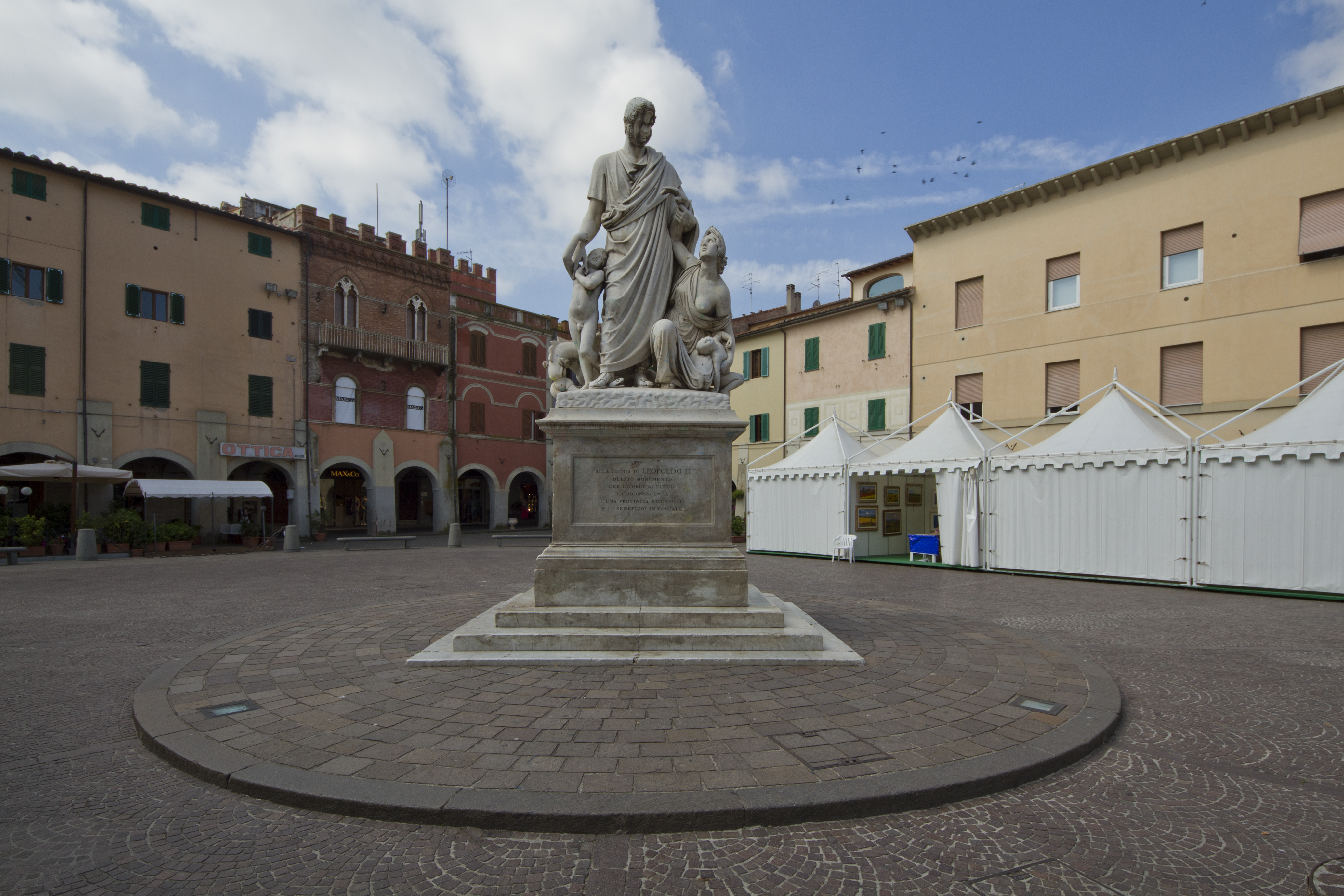 Moumento a Leopoldo II di Lorena, Grosseto, Italy